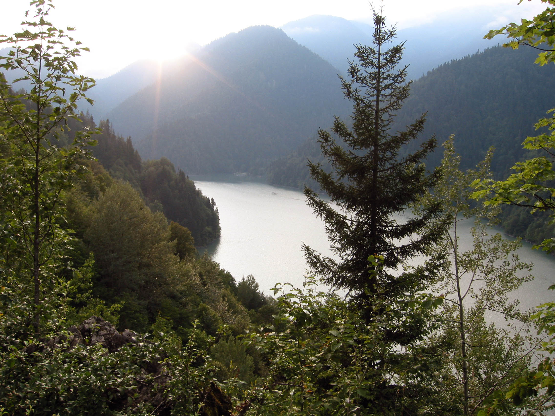 Ritsa lake (from upper side)